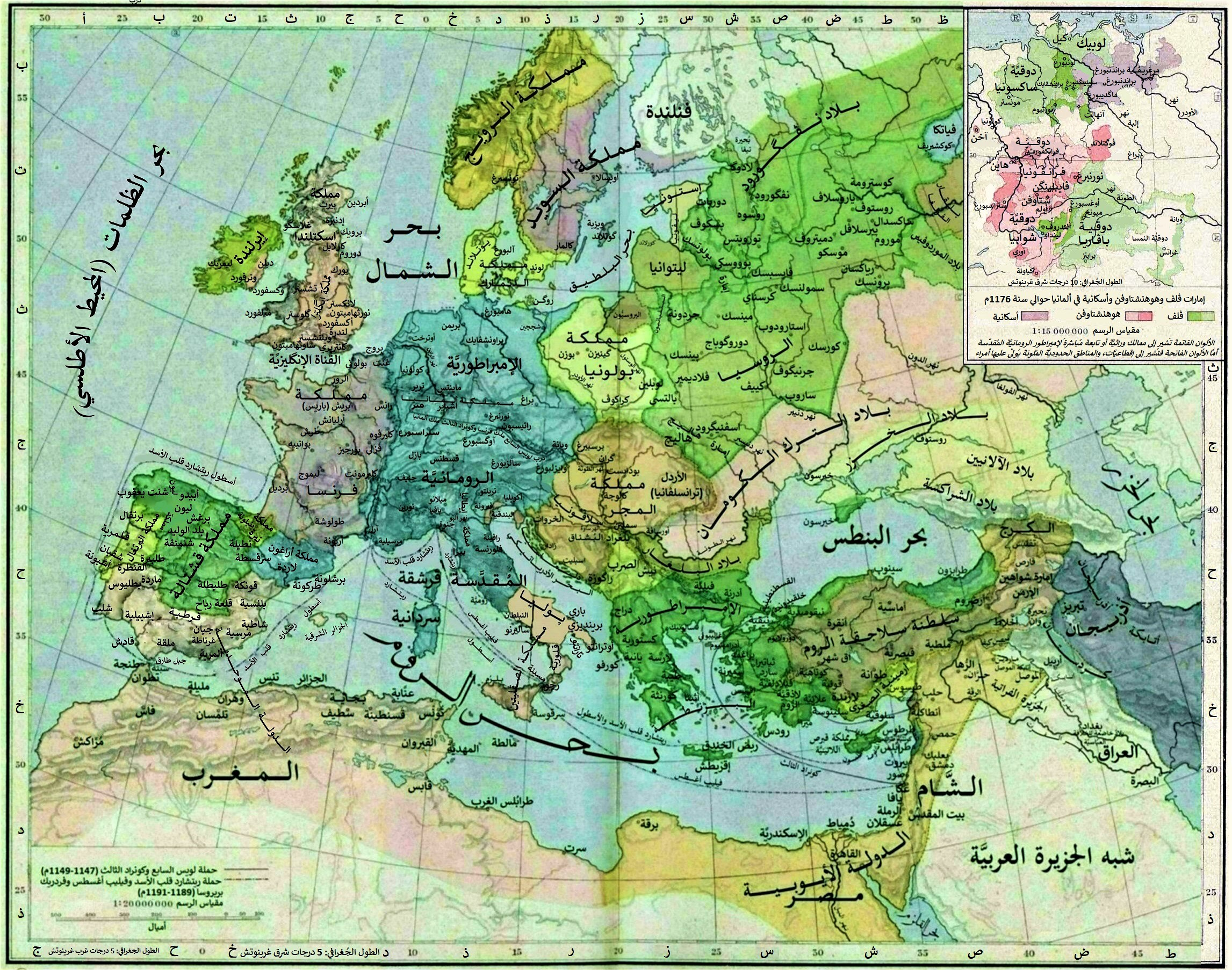 خريطة أوروپَّا سنة 1190م.